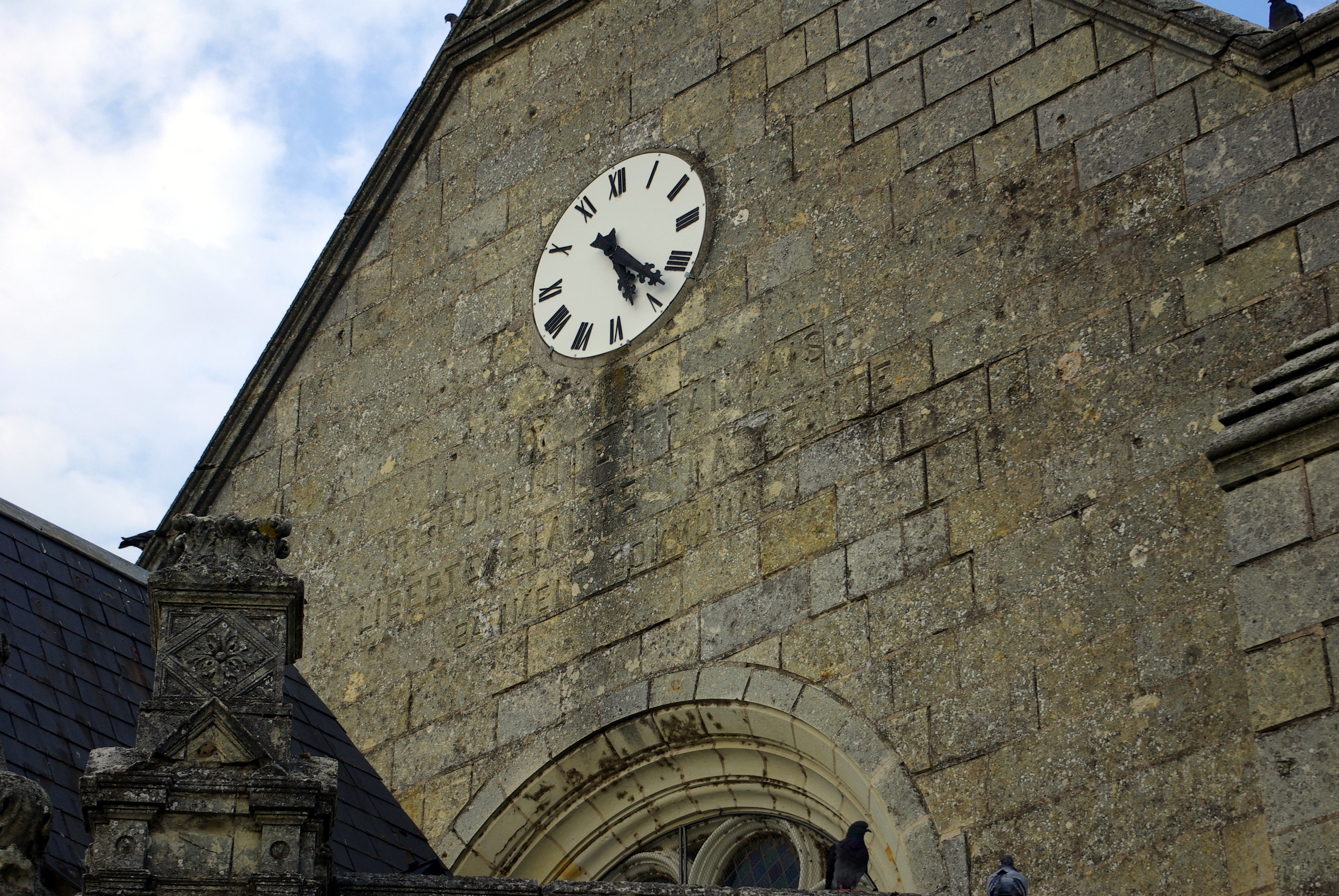 Inscription gravée sur l'église de la Translation de Saint-Martin à La-Chapelle-sur-Loire : REPUBLIQUE FRANCAISELIBERTE EGALITE FRATERNITE BATIMENT COMMUNAL .